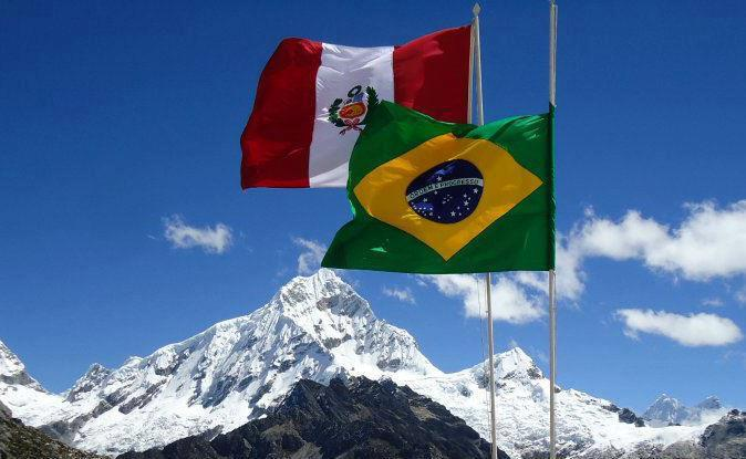 Banderas de Perú y Brasil en el campamento de la constructora Odebrecht en la Punta Olímpica